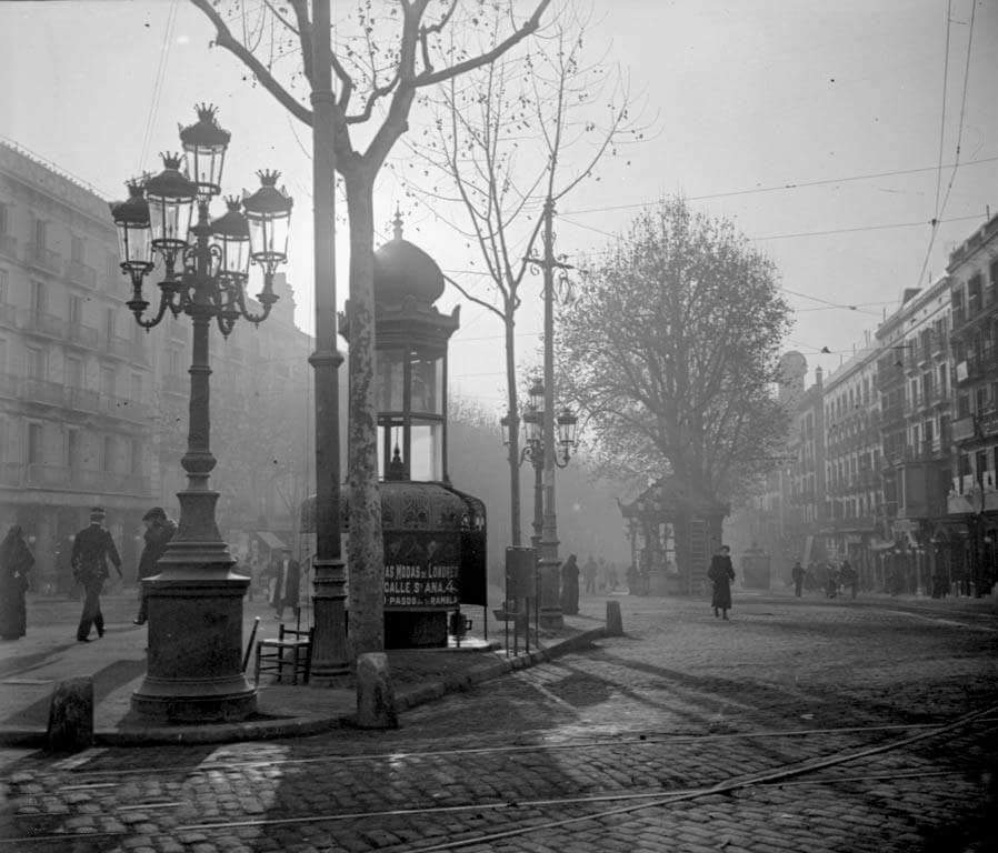 Cruce de la calle Pelayo con la plaza de Cataluña, Barcelona, hacia 1900-1910.